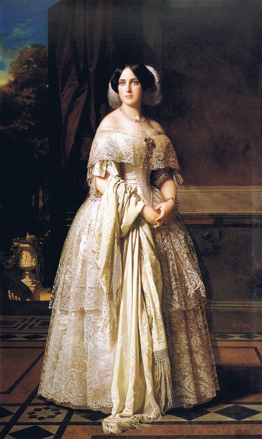 Retrato de Josefa del Águila y Ceballos Alvarado y Álvarez de Faria (1826-1888), casada en 1850 con José de Narváez Porcel, II vizconde de Aliatar y años después II duque de Valencia.